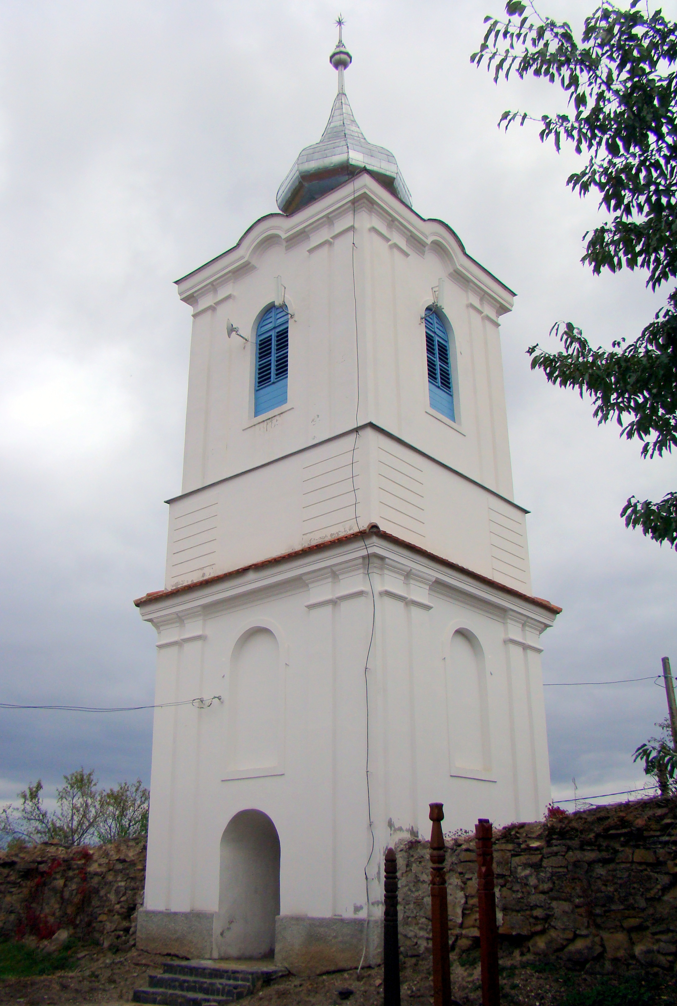 Zid de incintă, cu turn-clopotniță, sat Albiș; comuna Cernat 158 sec. XV - XVI, turn ref. 1637, transf. sec. XIX 02